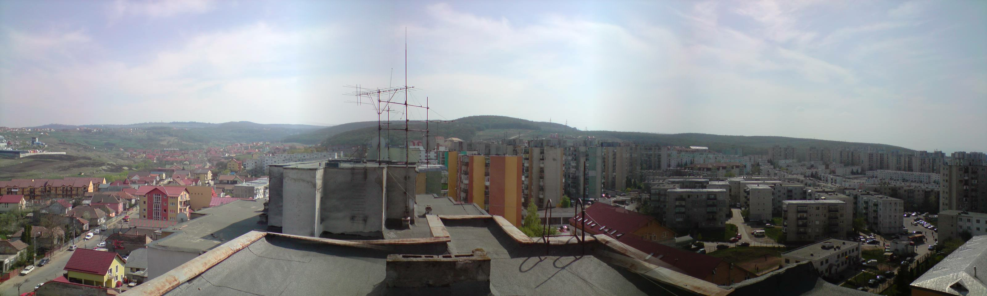 Kolozsmonostori Panoráma